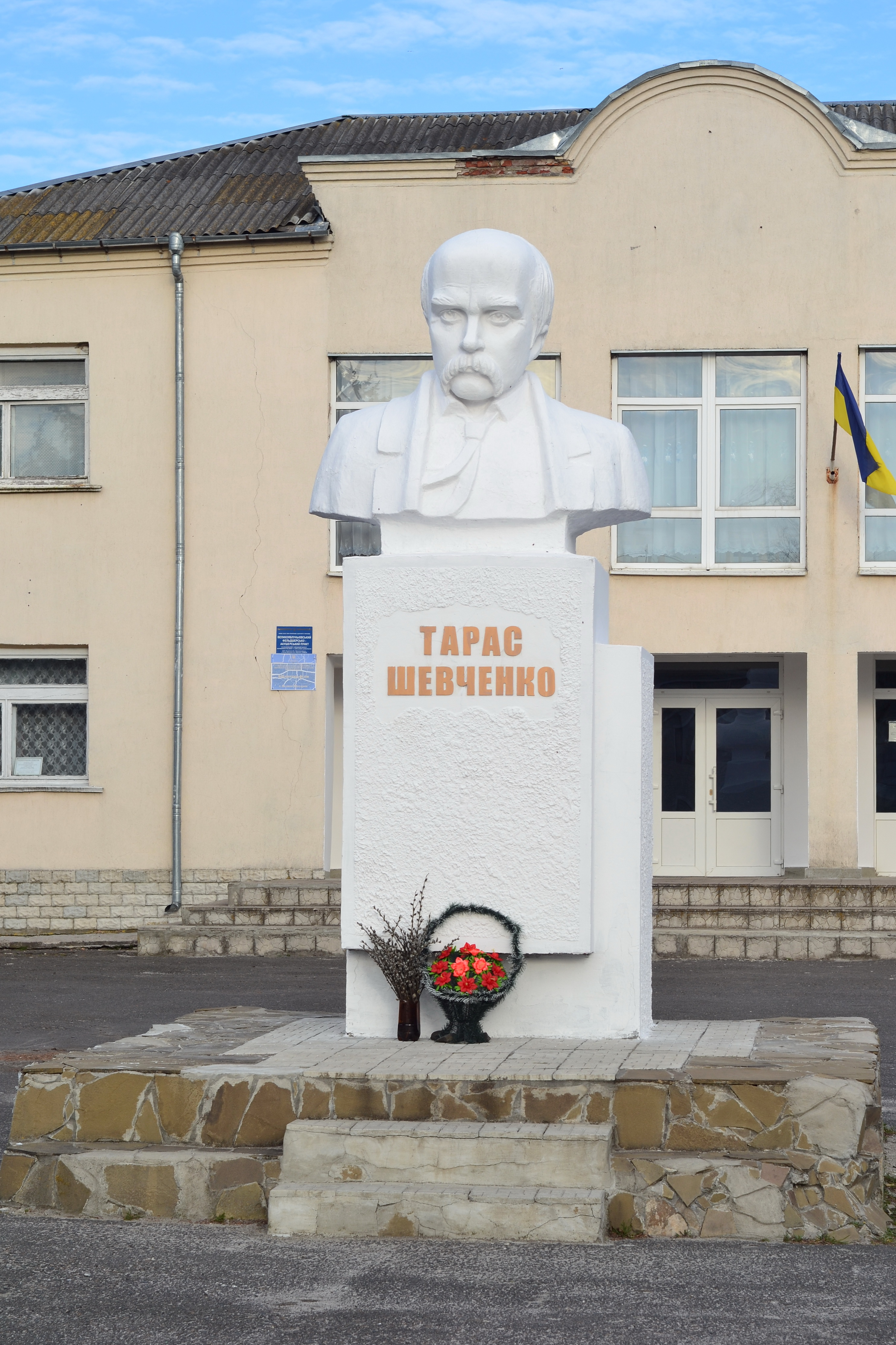 Пам'ятник Т.Г. Шевченко - Велика Яблунька (вул. Перемоги, навпроти будинку культури) Маневицький район Волинська область Україна